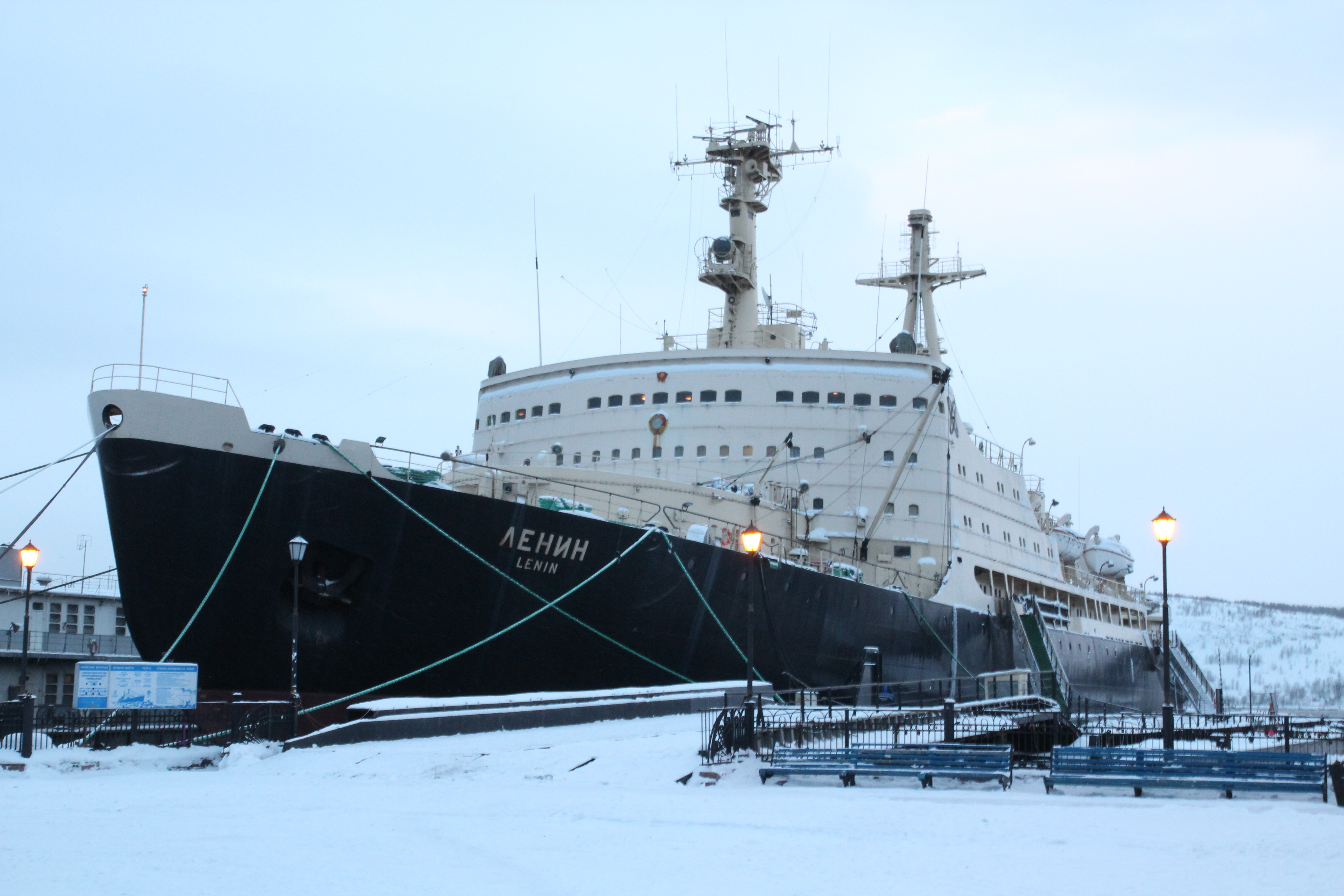 Ленин в январе 2013